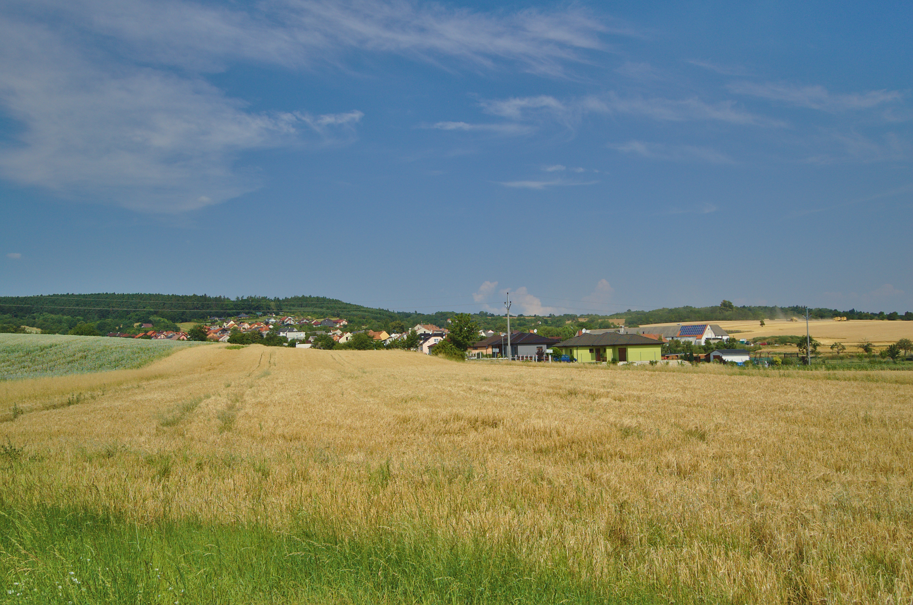 Pohled na Slatinky od jihovýchovdu, okres Prostějov